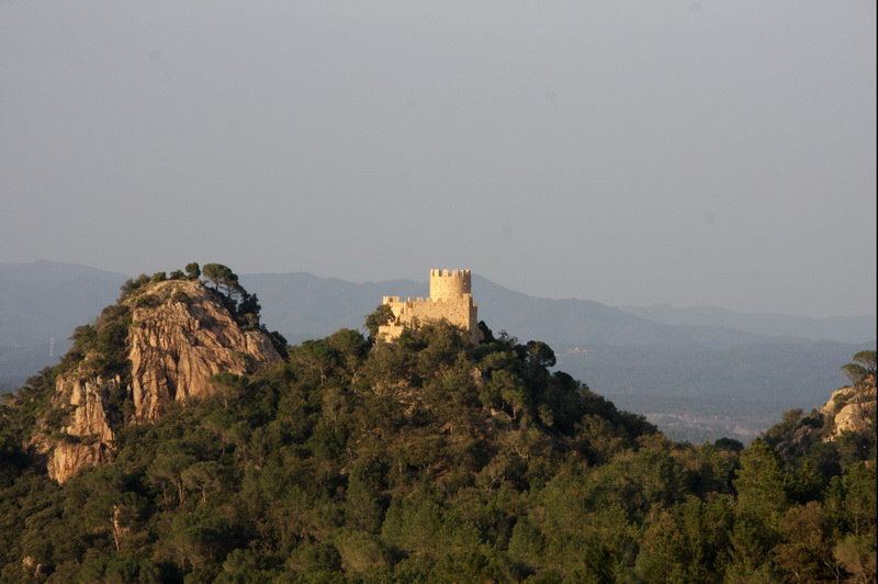 Castell de Santa Coloma de Farners (Catalunya), originari de 1046 i restaurat al 2002.